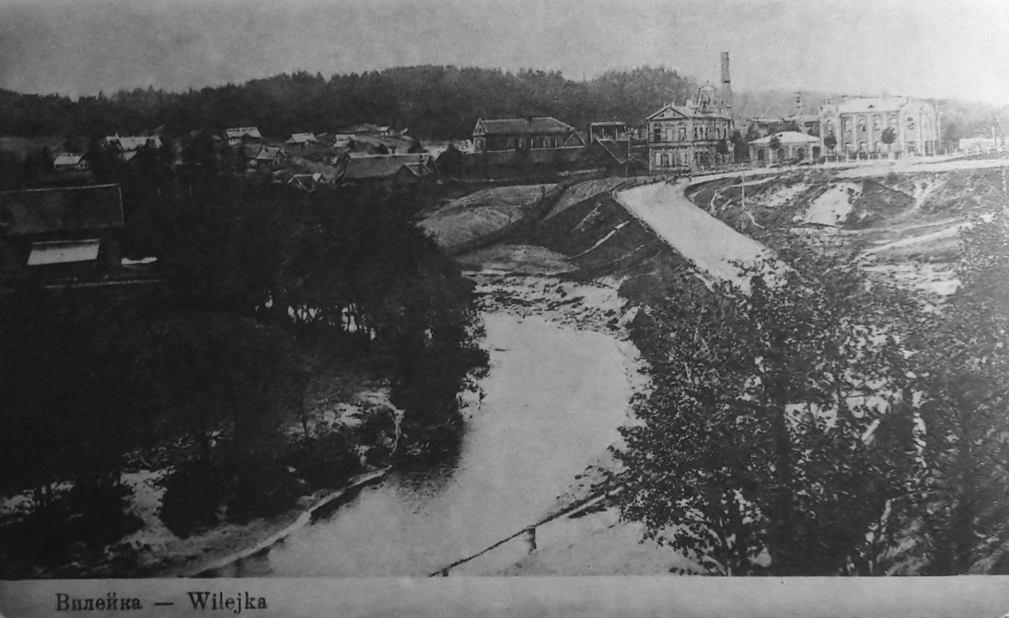 Беларуская (тарашкевіца): Новая Вільня (Novaja Vilnia), часам памылкова атрыбутуецца як Вялейка (Vialejka)